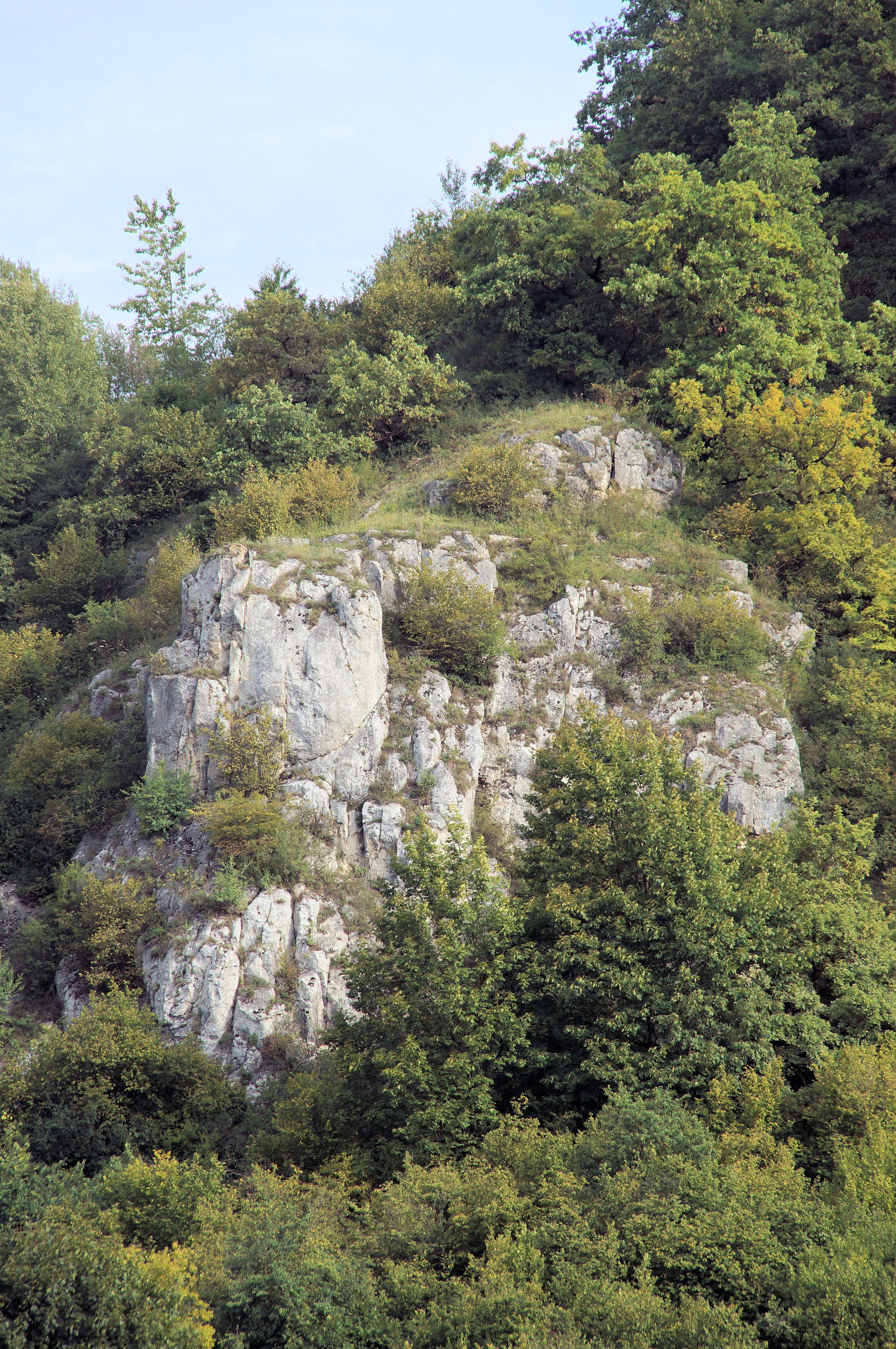 Geotop Nr.:362R003, Felsgruppe am SW-Teil des Keilbergs, Felsgruppe, Schichtfolge, NSG Am Keilstein, Regensburg